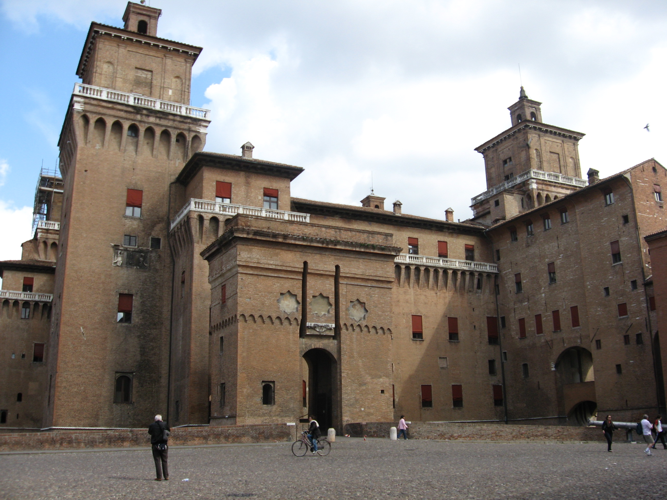 Castello Estense This is a photo of a monument which is part of cultural heritage of Italy.